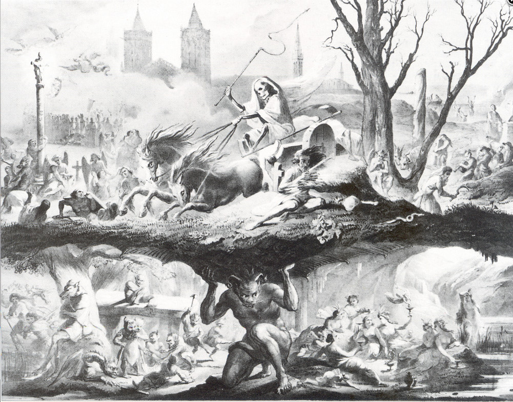 Les Merveilles de la nuit de Noël / Burzudou Nedellek, gravure offerte en 1844 avec l'ouvrage Le Foyer Breton dʼEmile Souvestre. Musée de Bretagne, Rennes.